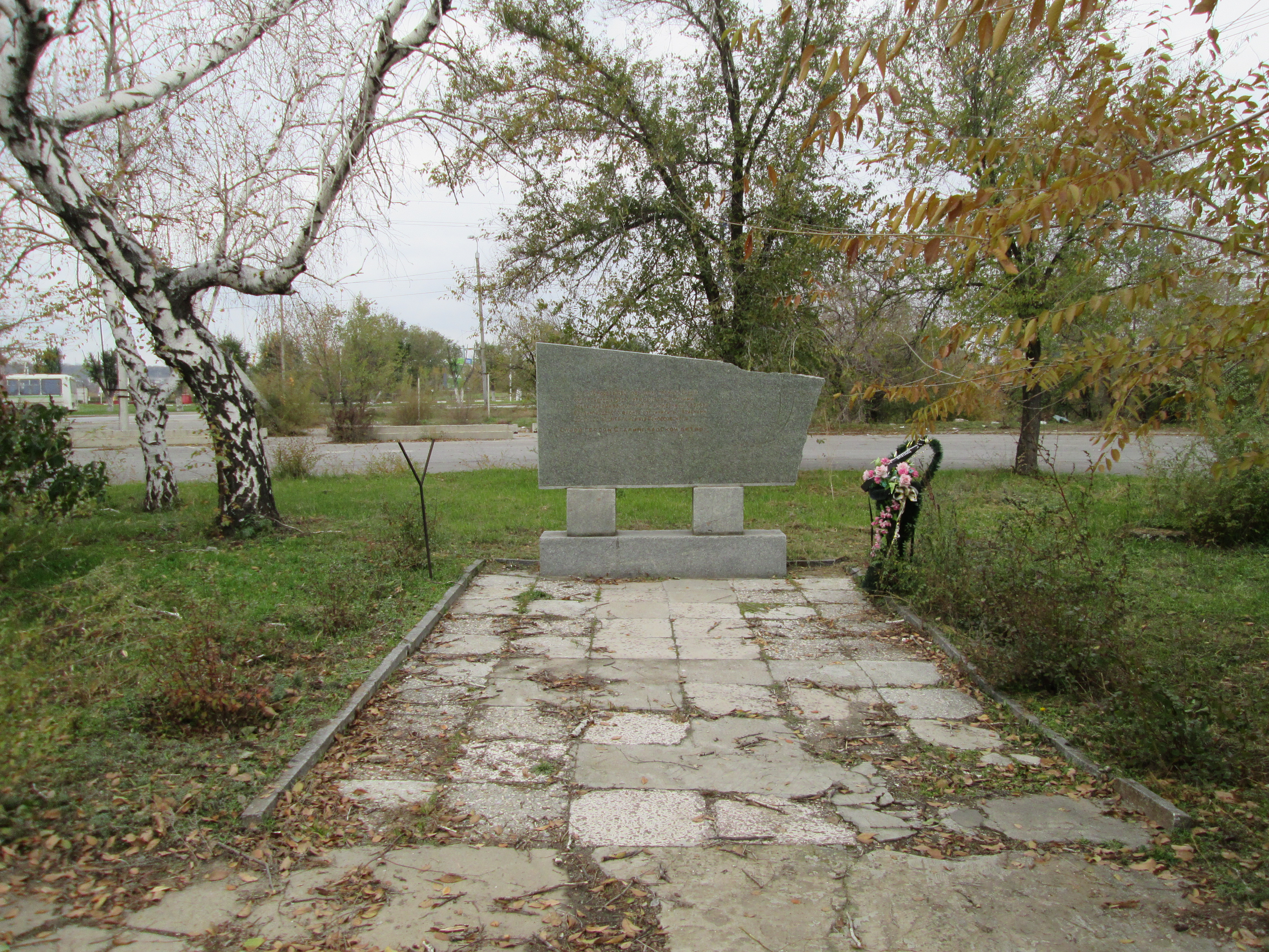 Место, где произошло соединение группы полковника Горохова С.Ф. с войсками Донского фронта